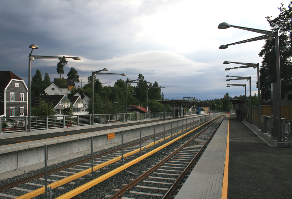 Bjørnsletta T-banestasjon sett fra plattformen mot Jar stasjon.